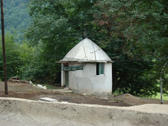 Ahoudasht-Sari-Mazandaran-Iran